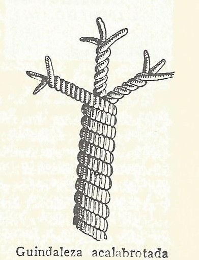 Guindaleza acalobrotada.